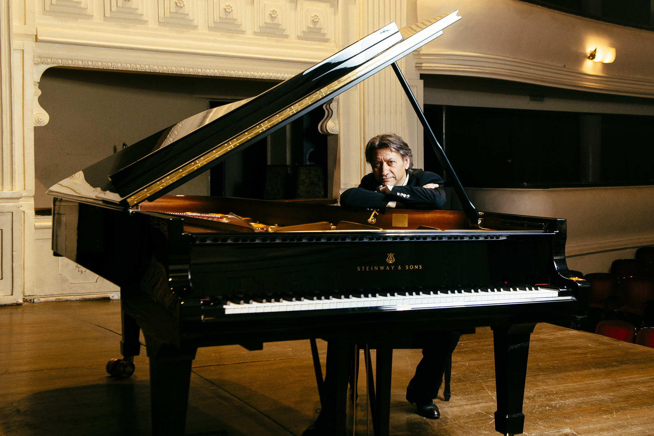 Fotografía tomada en el año 2014